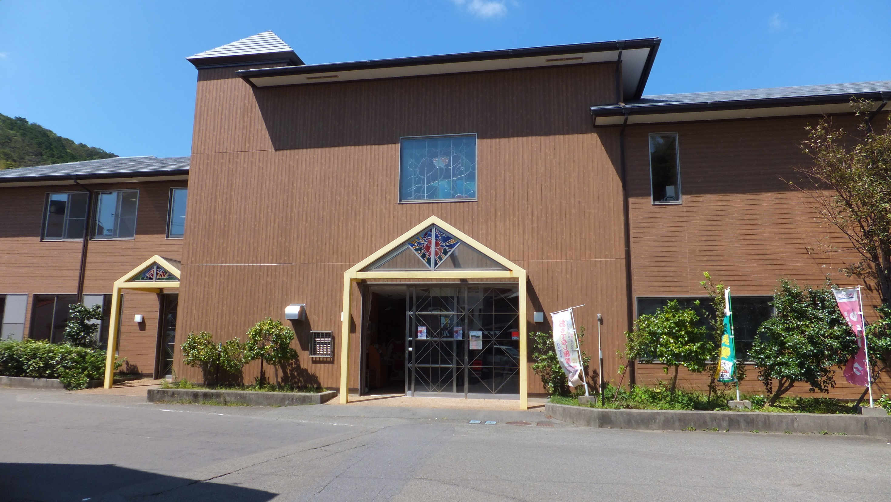 JR牟岐線 由岐駅 駅舎 （徳島県海部郡美波町 2015年）